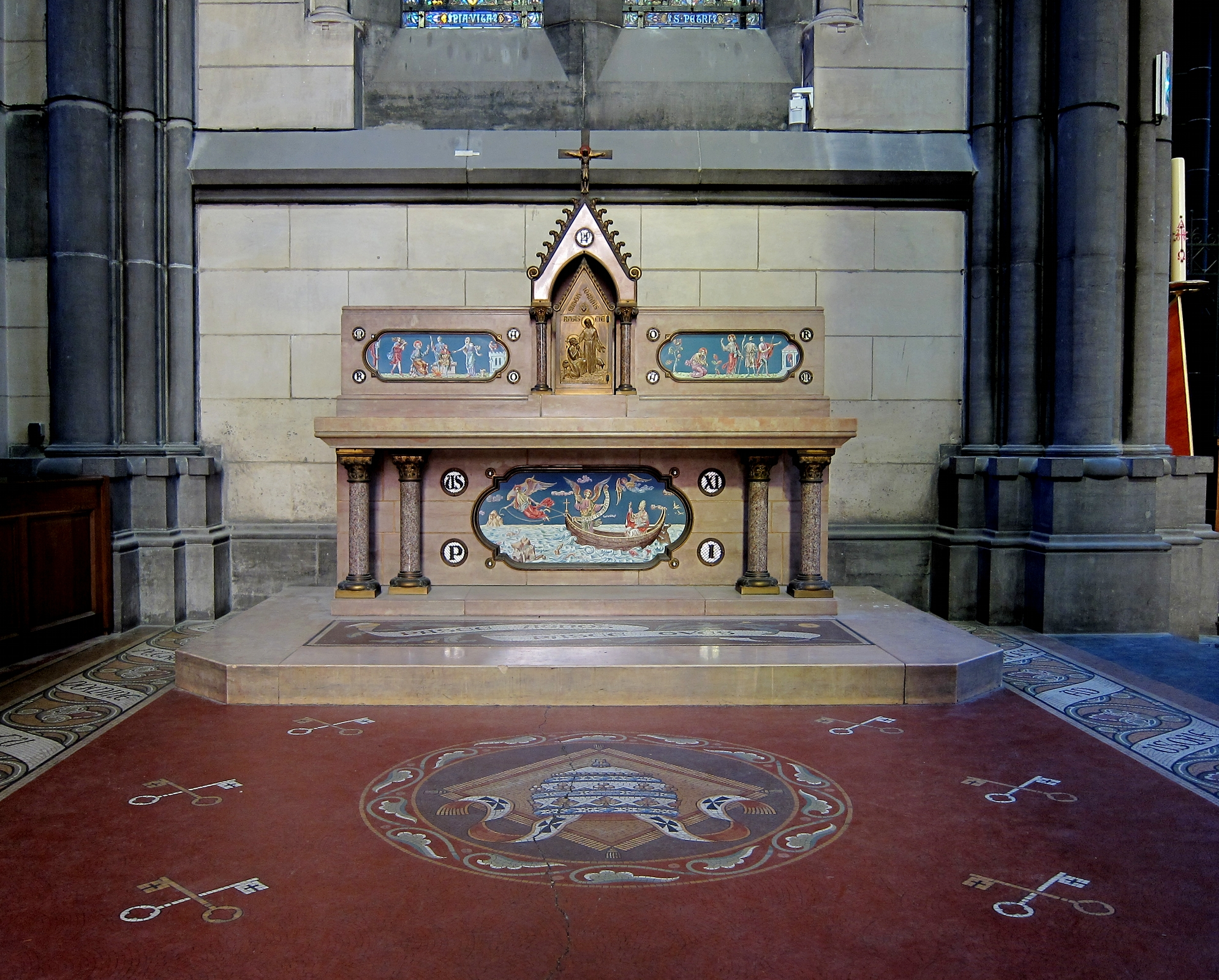 La chapelle saint Pierre de la cathédrale Notre-Dame-de-la-Treille à Lille (Nord).